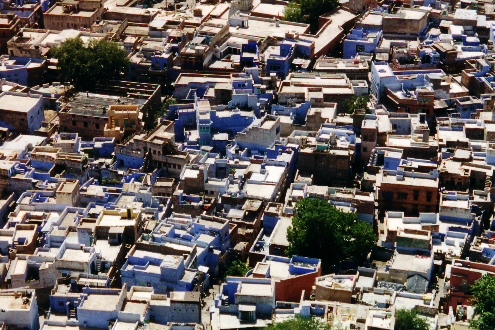 Jodhpur (taken in september 2002)